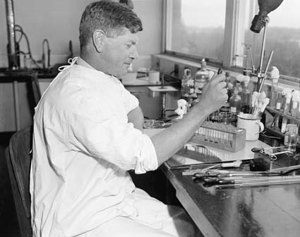 Sir Frank Macfarlance Burnet